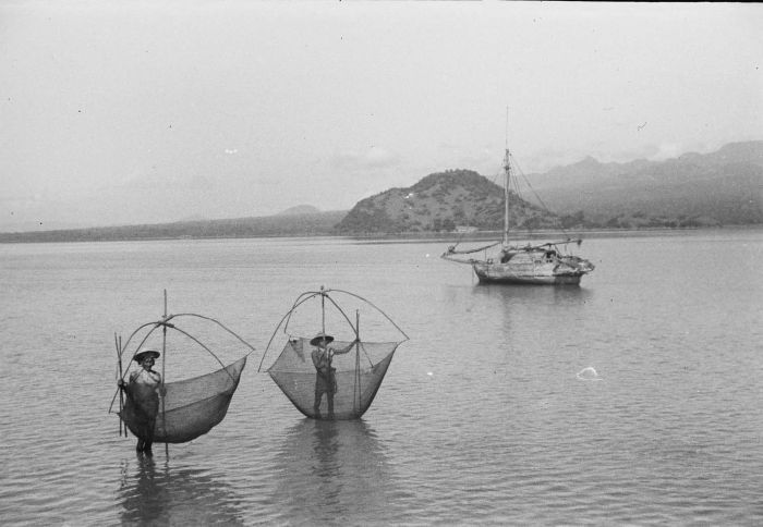 negatief. Vissers met kruisnetten in de Bima-baai of Sape-baai